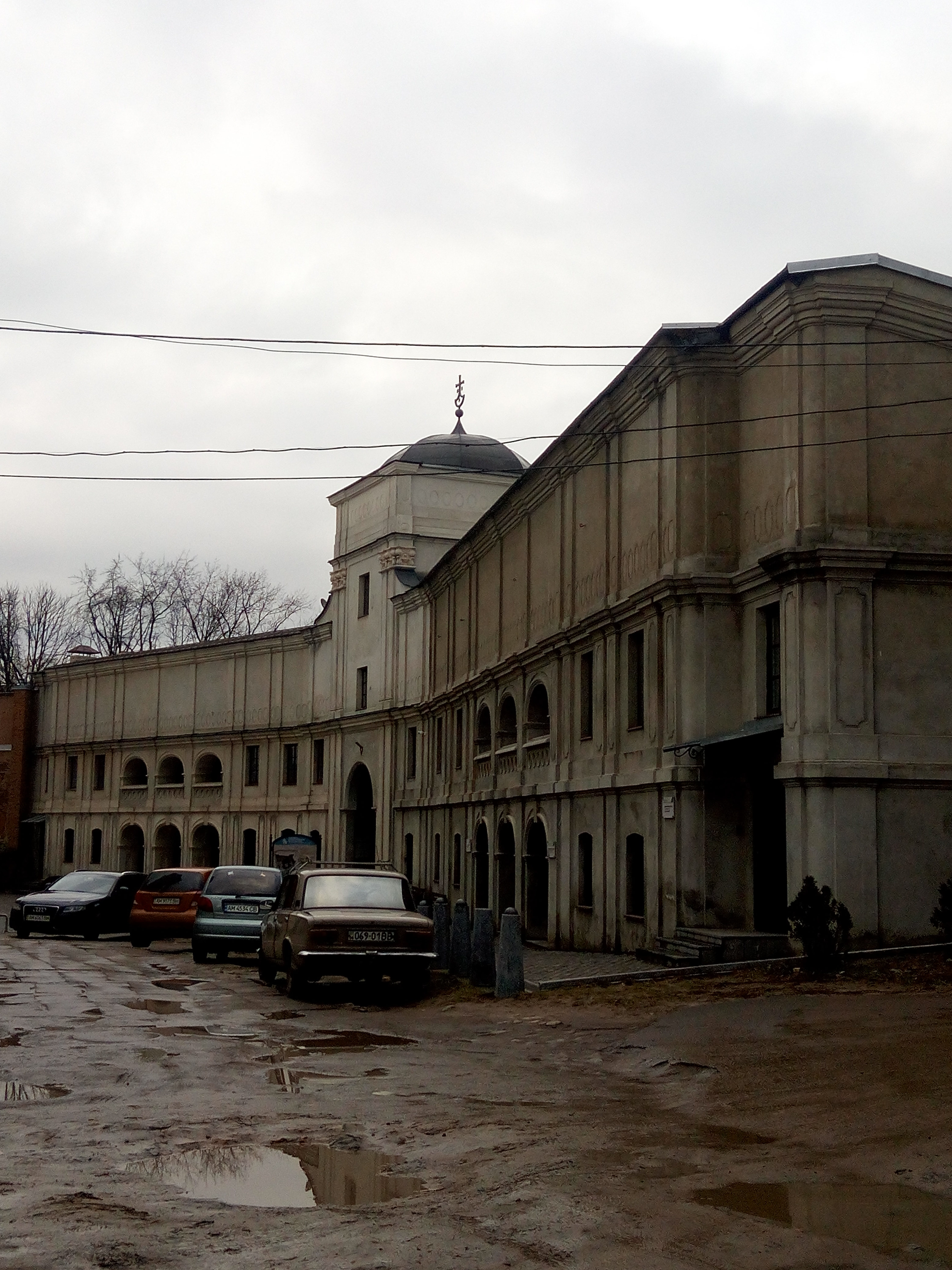 Монастир Босих Кармелітів у Бердичеві. Прибрамний комплекс